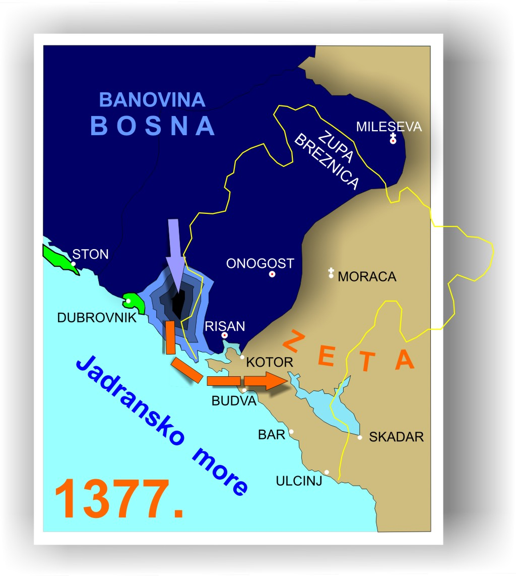 Početkom 1377. godine župe Dračevica, Konavle i Trebinje (raniji posjedi srpskog vlastelina Nikole Altomanovića) otkazuju poslušnost vladaru Zete Đurađu I Balšiću. Ban Tvrtko I (od oktobra iste godine kralj „Srba, Bosne, Primorja i Zapadnih strana“) prisajedinjuje ih Bosni. (Grupa autora: "Istorija Crne Gore", Titograd 1970. godine, knjiga II, tom 2.)